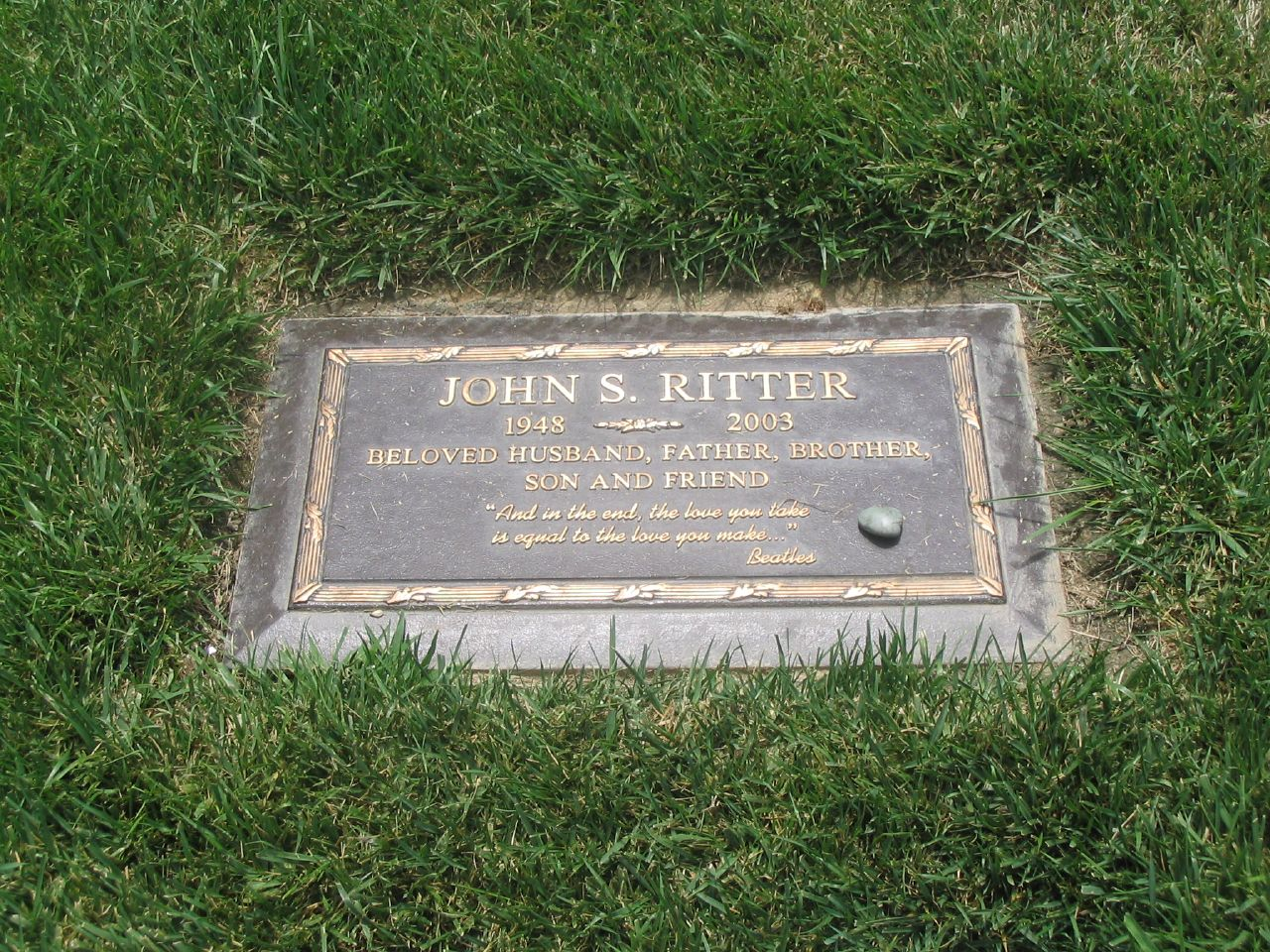 John Ritter's gravestone.